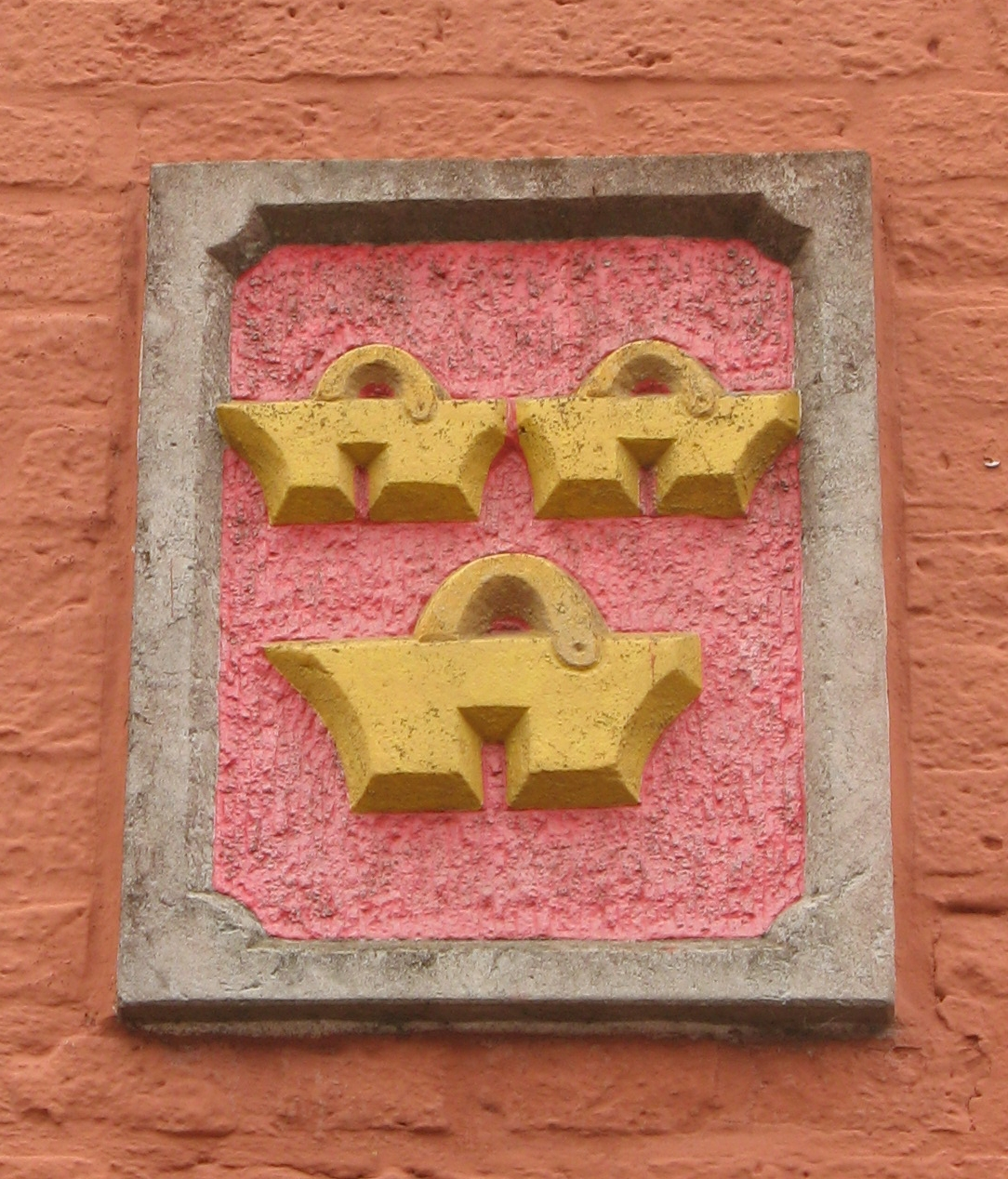 Hausmarke in Friedrichstadt Author: Dirk Ingo Franke